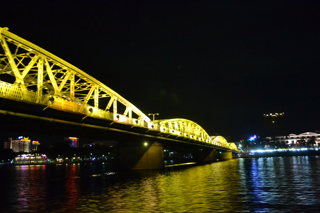 cầu Trường Tiền về đêm 2011